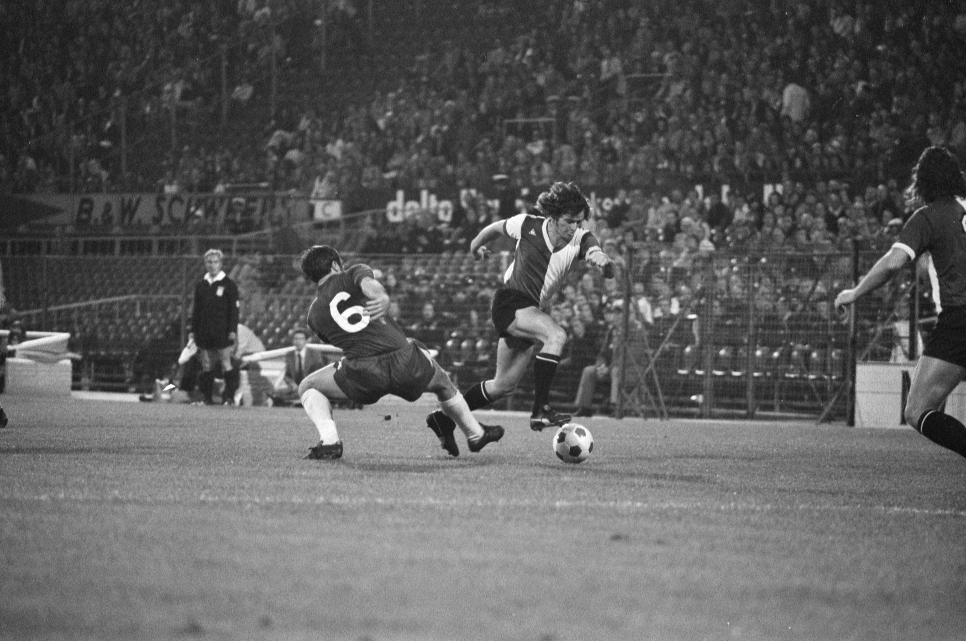 Collectie / Archief : Fotocollectie Anefo Reportage / Serie : [ onbekend ] Beschrijving : Feyenoord tegen Chelsea (oefenwedstrijd), Kristensen in actie Datum : 3 augustus 1974 Locatie : Chelsea Trefwoorden : sport, voetbal Instellingsnaam : Feyenoord Fotograaf : Peters, Hans / Anefo Auteursrechthebbende : Nationaal Archief Materiaalsoort : Negatief (zwart/wit) Nummer archiefinventaris : bekijk toegang 2.24.01.05 Bestanddeelnummer : 927-3658